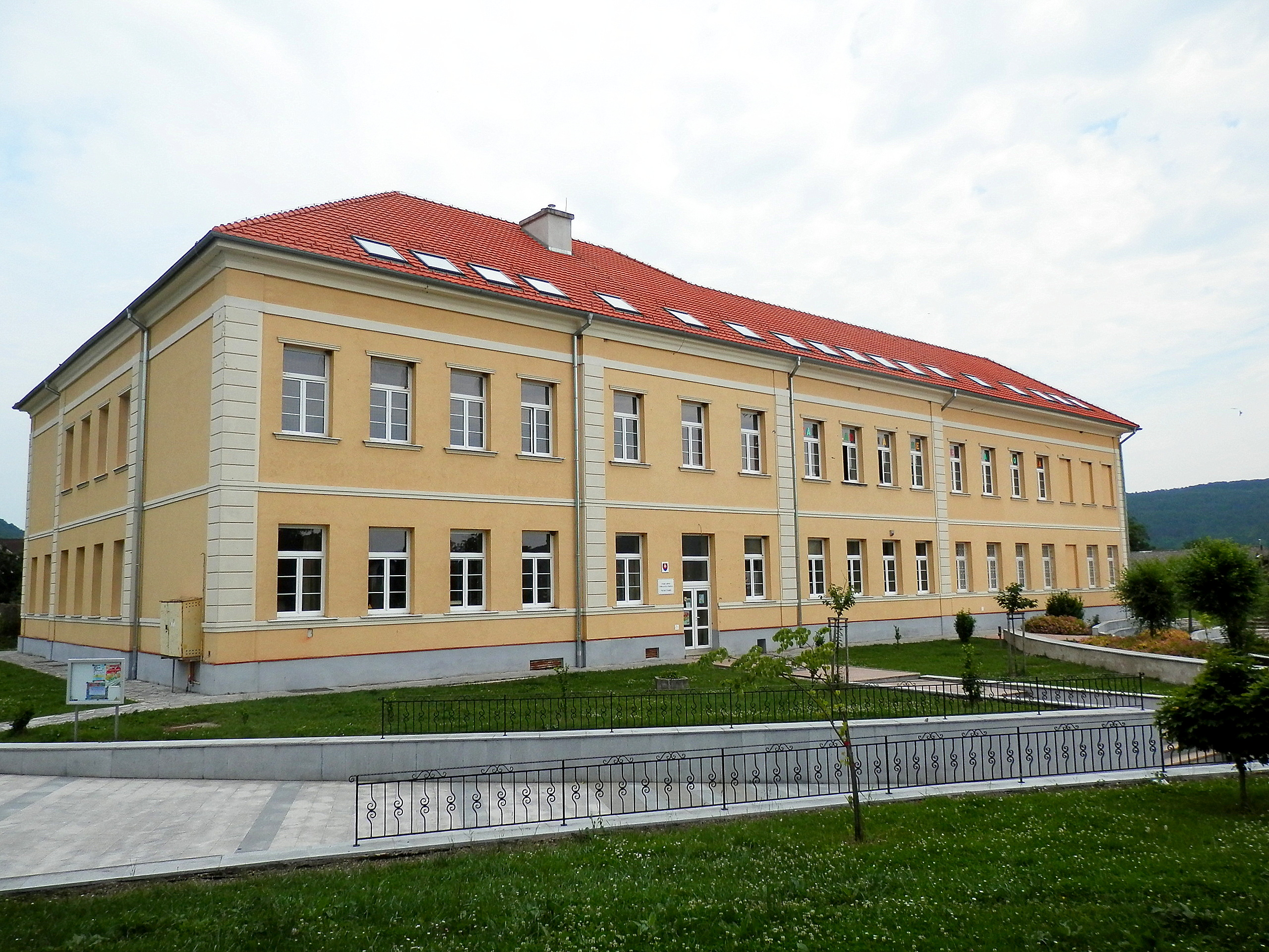 Základná škola . Mesto Veľký Šariš, okres Prešov.